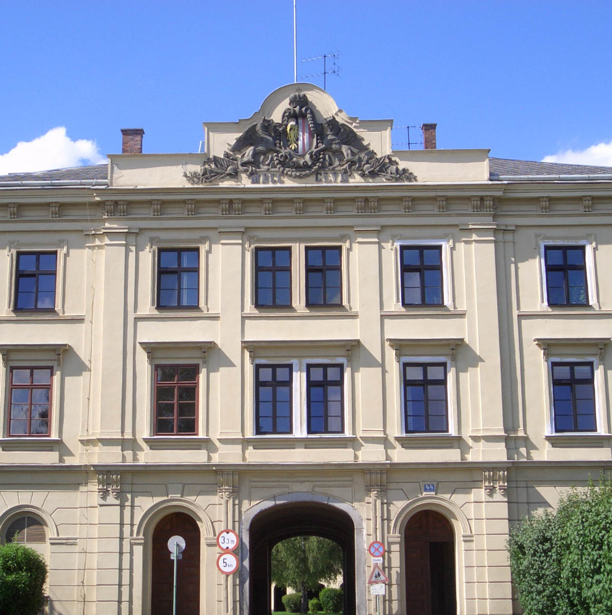 Dragonerkaserne in Wels, Südeingang